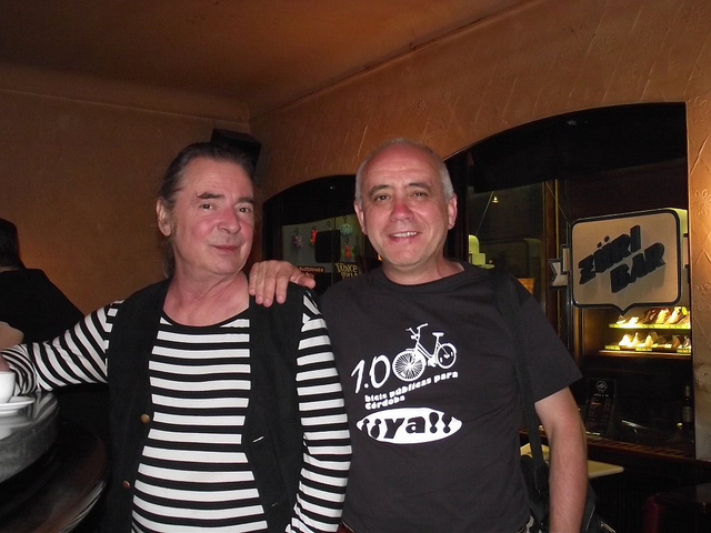 Urban Gwerder (a la izquierda) y yo.